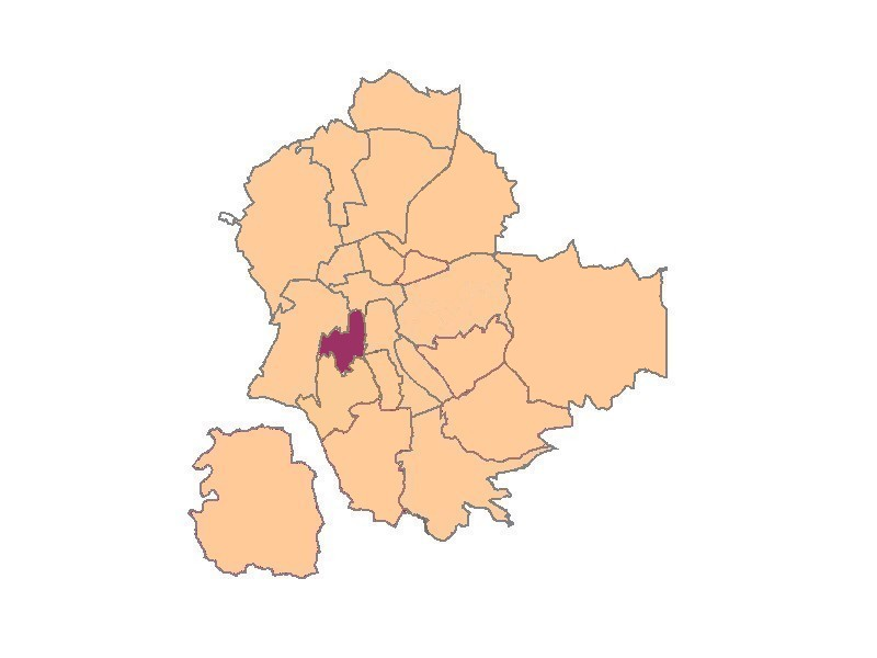 plan de saint-etienne quartier de Colline des Pères, Tardy